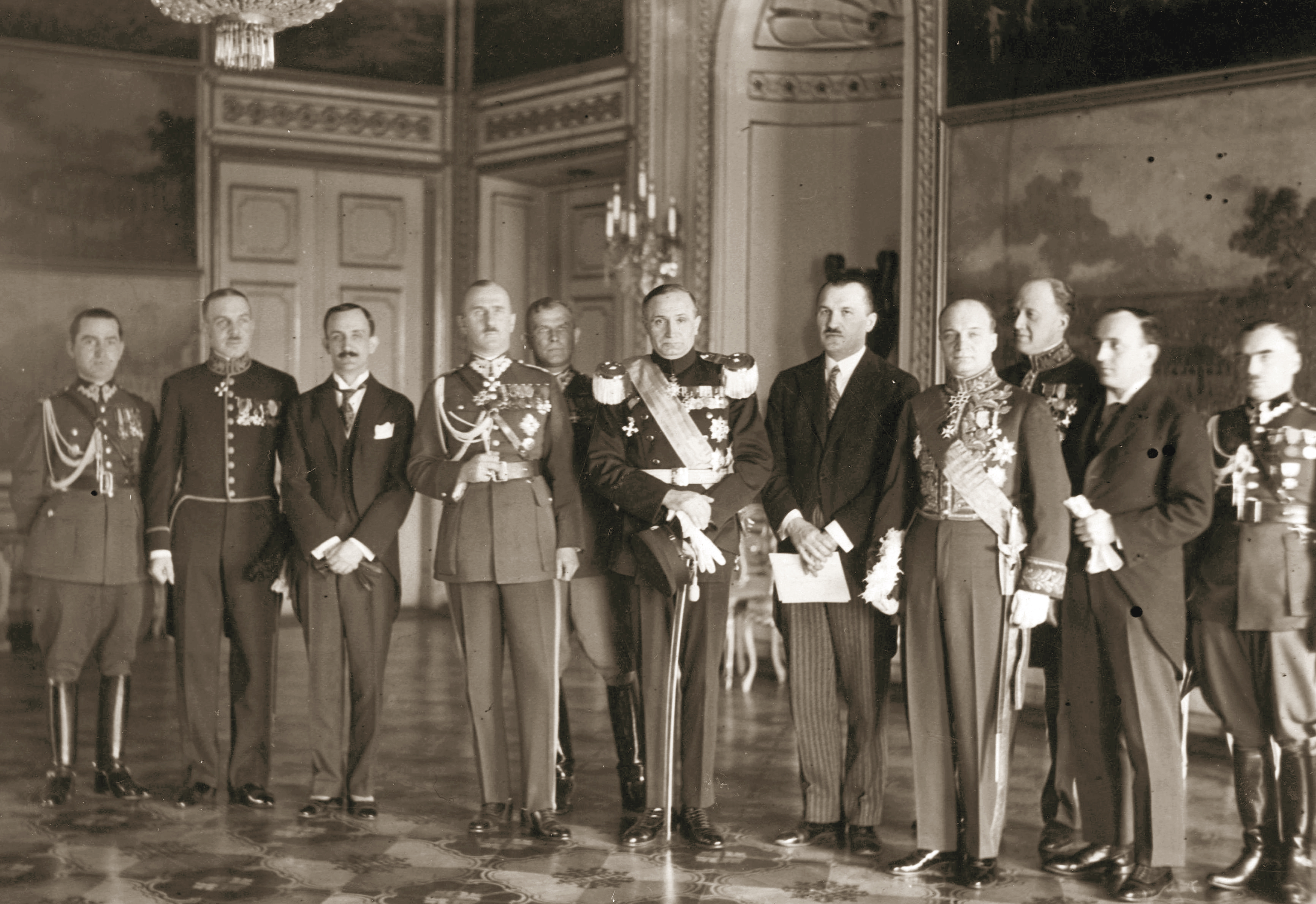 Złożenie listów uwierzytelniających prezydentowi RP Ignacemu Mościckiemu przez posła nadzwyczajnego i ministra pełnomocnego Jugosławii w Polsce Branco Lazarevicia 14 marca 1929 r. Poseł nadzwyczajny i minister pełnomocny Jugosławii w Polsce Branco Lazarević (szósty z lewej) w towarzystwie: ppłk. Wojciecha Fydy (pierwszy z lewej), radcy Kancelarii Cywilnej Prezydenta RP Michała Mościckiego (drugi z lewej), radcy legacyjnego Poselstwa Jugosławii Anitica, szefa Gabinetu Wojskowego Prezydenta RP płk. Jana Głogowskiego (czwarty z lewej), adiutanta prezydenta RP rtm. Wacława Calewskiego (piąty z lewej), szefa Kancelarii Cywilnej Prezydenta RP Adama Lisiewicza (siódmy z lewej), szefa Protokołu Dyplomatycznego MSZ Karola Romera (czwarty z prawej), zastępcy szefa Protokołu Dyplomatycznego MSZ Rajnolda Przeździeckiego (trzeci z prawej), sekretarza Poselstwa Jugosławii Prodanovicia (drugi z prawej) i adiutanta prezydenta RP kpt. Bolesława Suszyńskiego (pierwszy z prawej). Koncern Ilustrowany Kurier Codzienny - Archiwum Ilustracji. Sygnatura: 1-D-908